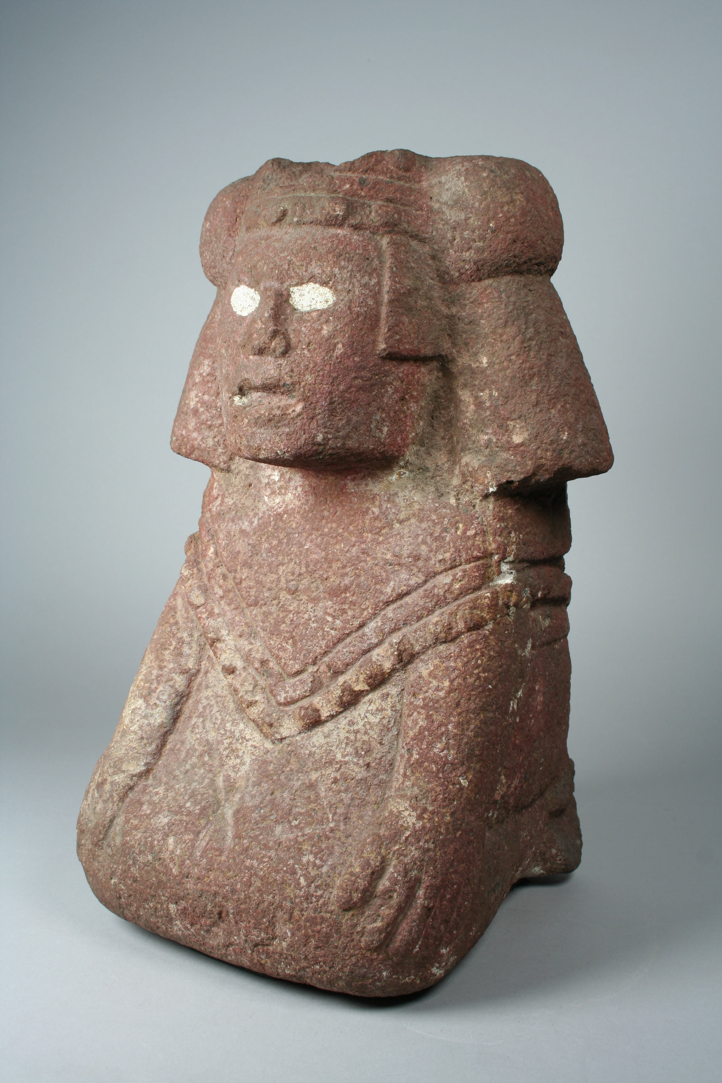 Aztec; Figure; Stone-Sculpture